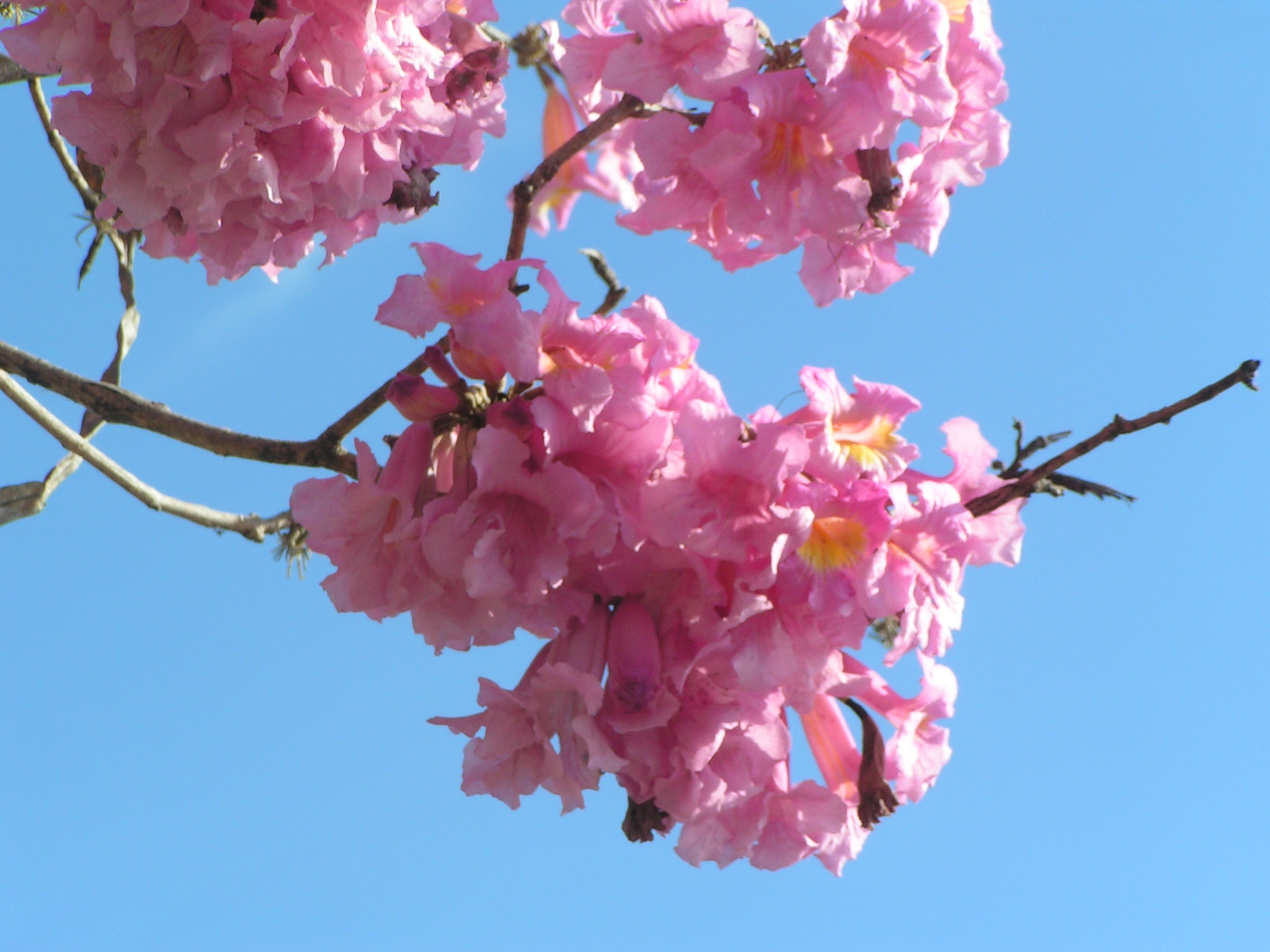 Lapacho rosado (Tabebuia impetiginosa)